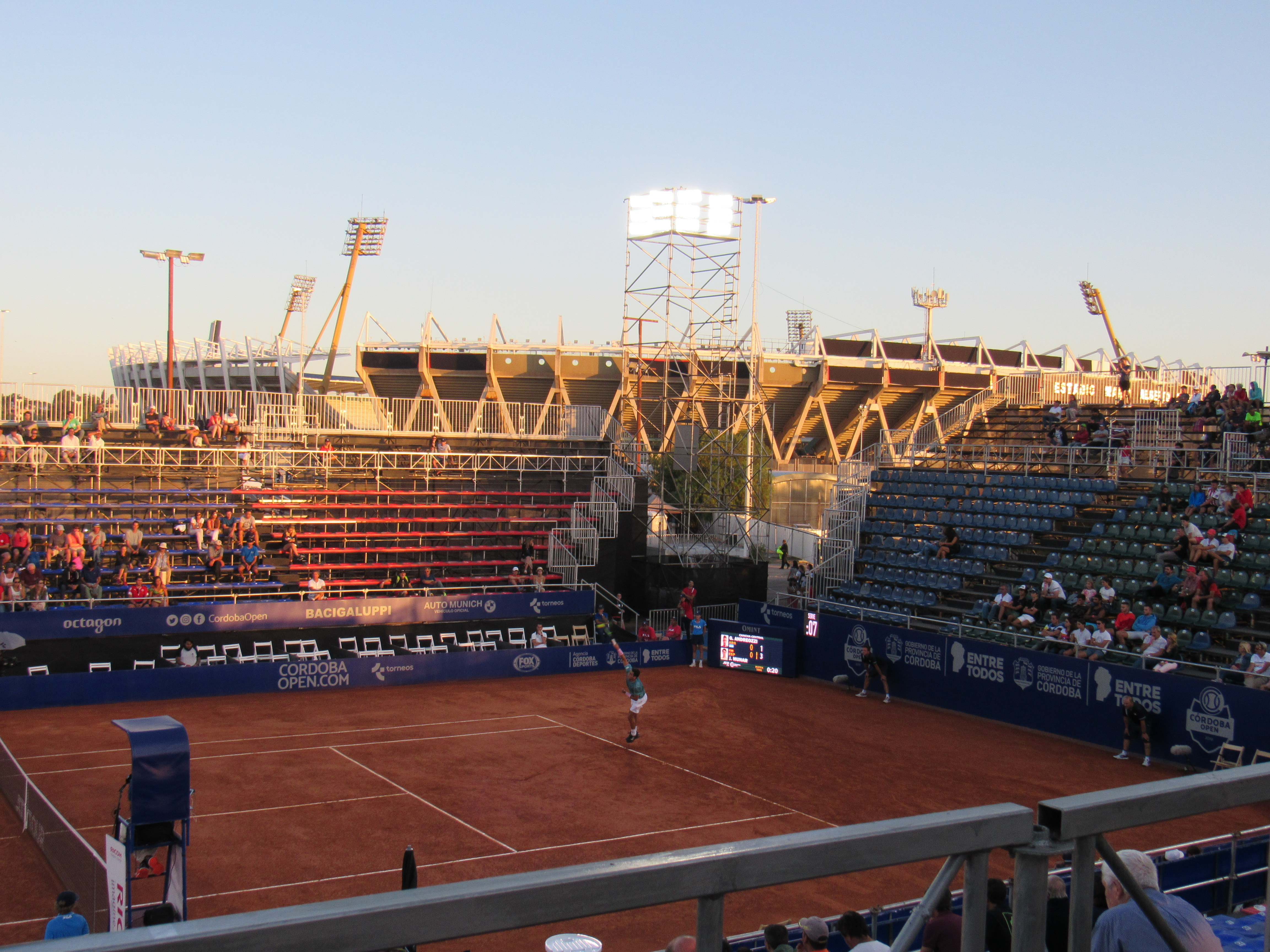 Cancha central - ATP 250 Córdoba Open 2019, Primera Ronda del Cuadro Principal - Predio del estadio Mario Alberto Kempes